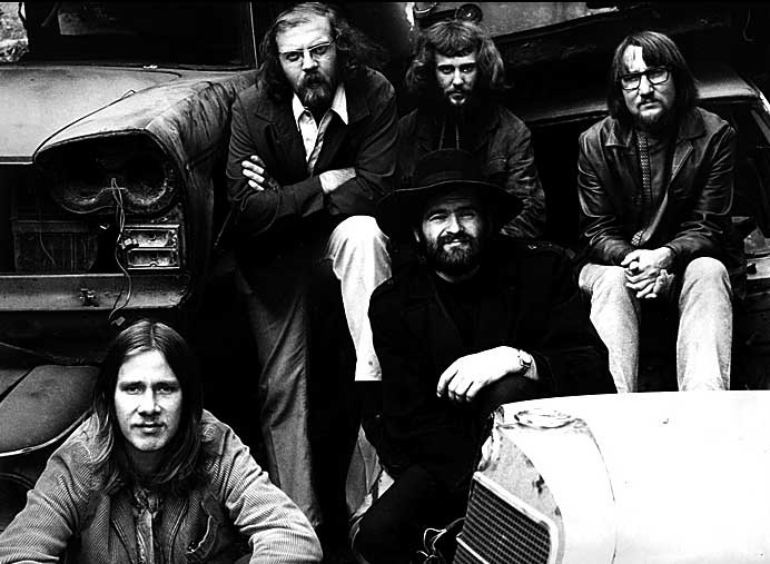 Floh de Cologne Pressefoto 1969